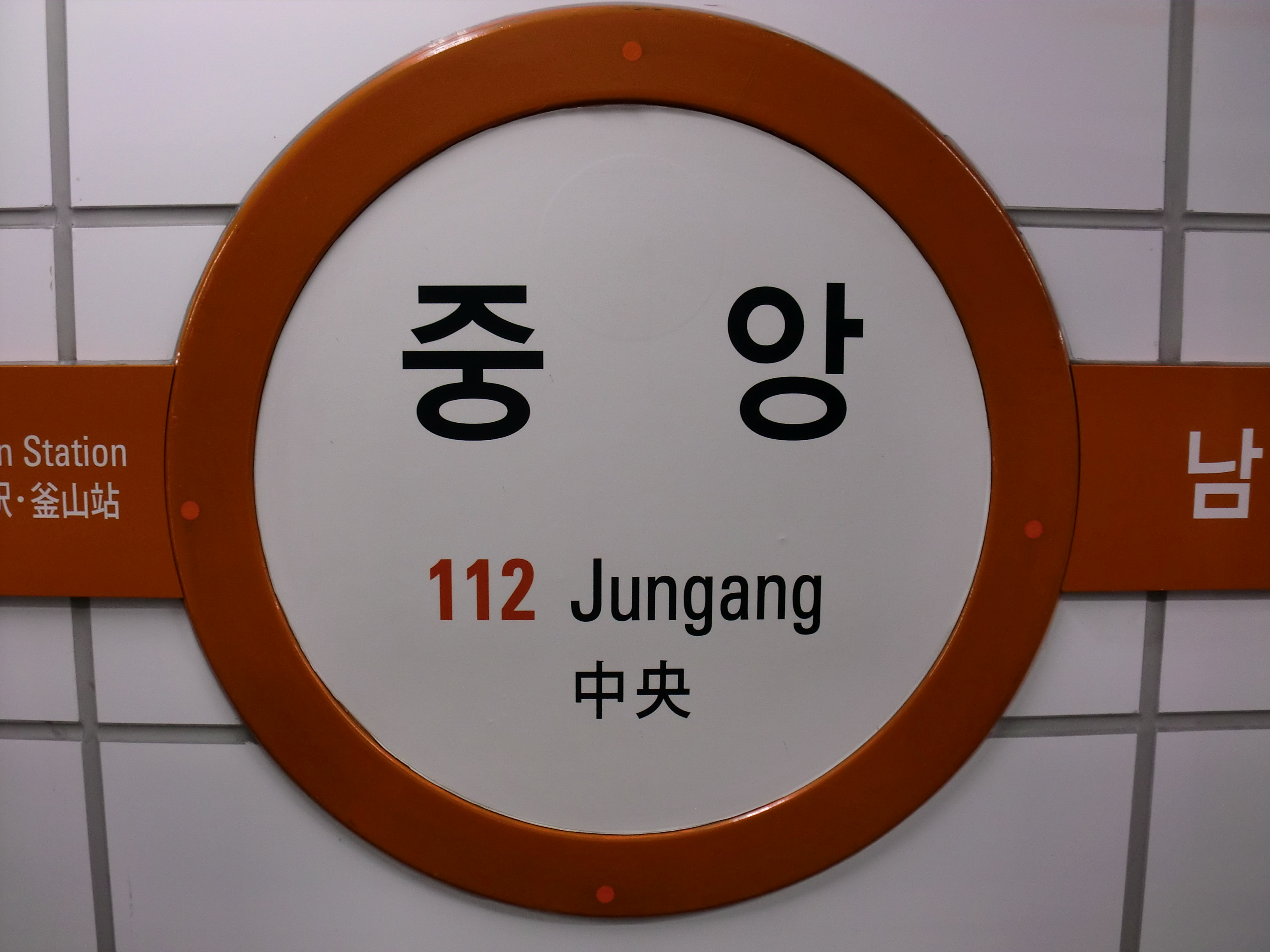 부산도시철도1호선 중앙역의 역명판(2013년)